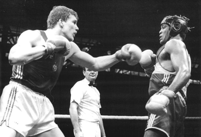 Ulli Kaden, Teafilo Stevenson ADN-ZB Lehmann 9.3.86-we-Halle: 15. Chemiepokal-Turnier im Boxen-Finale-Im Superwelter gewicht besiegte Ulli Kaden aus der DDR (SG Wismut Gera) den 3fachen Olympiasieger und 2fachen Weltmeister Teafilo Stevenson (Kuba) mit 5:0 Richterstimmen und machte sich selbst damit das schönste Geburtstagsgeschenk.